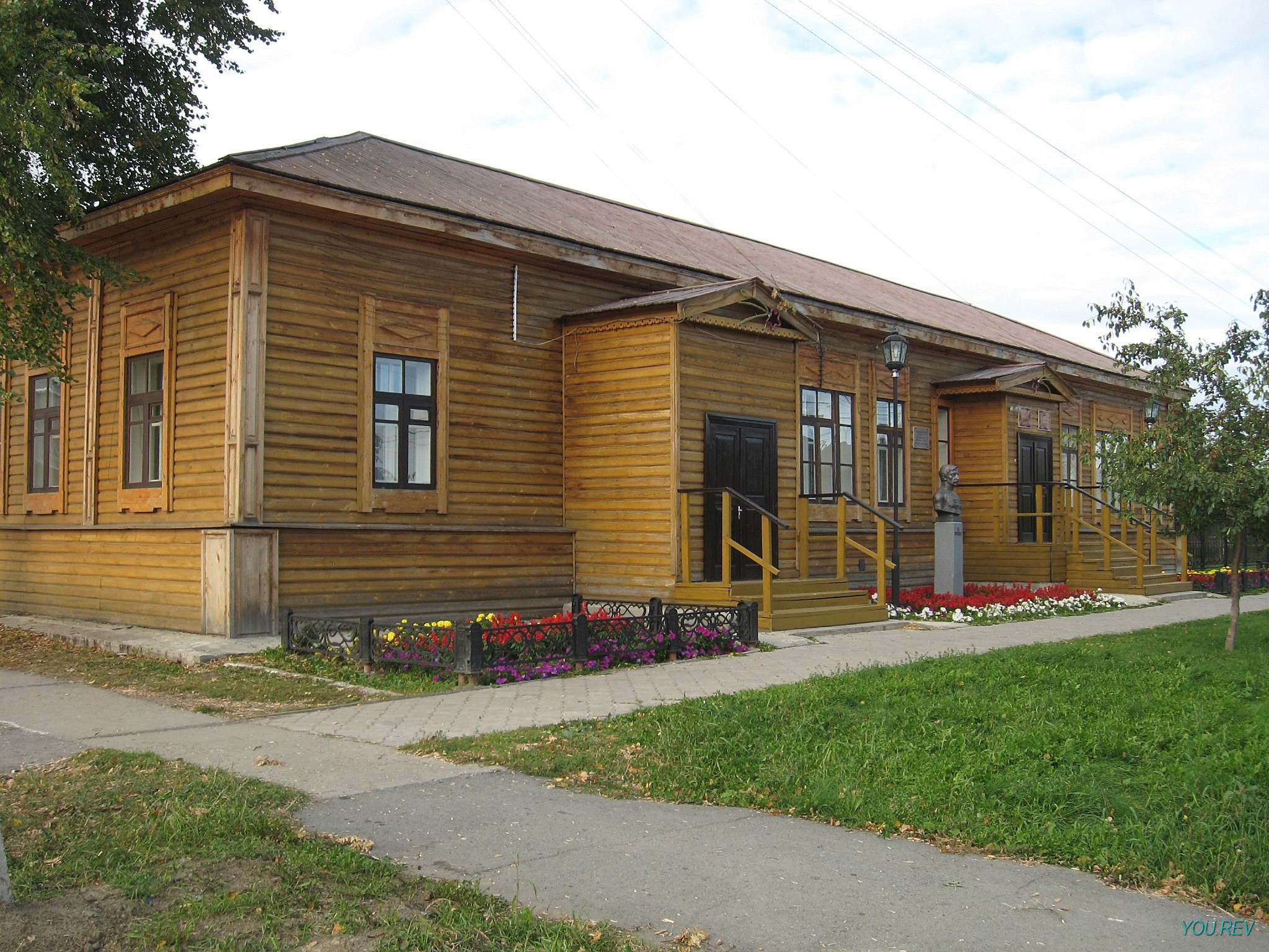 Здание, в котором размещалась школа в 1846г